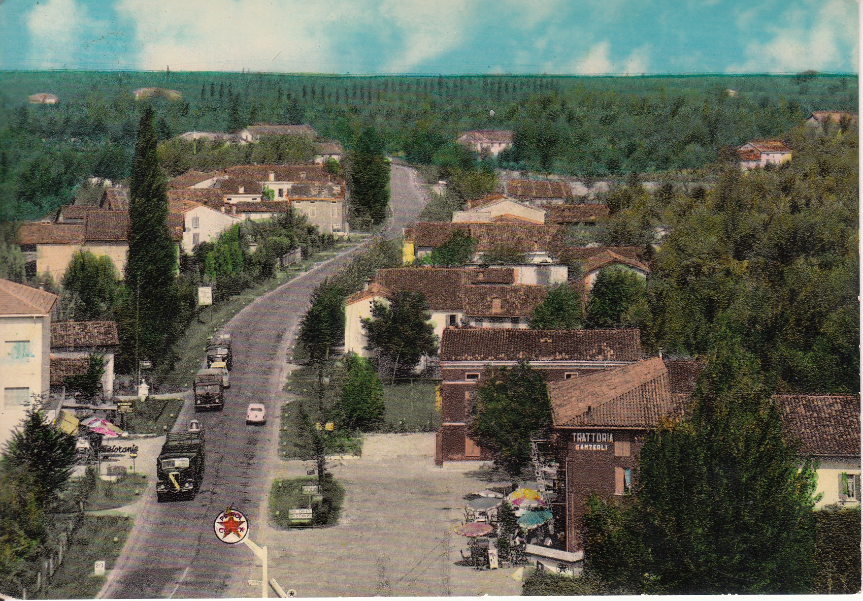 Vista di San Giacomo Roncole (Mirandola), con il ristorante Ganzerli nel 1960 circa